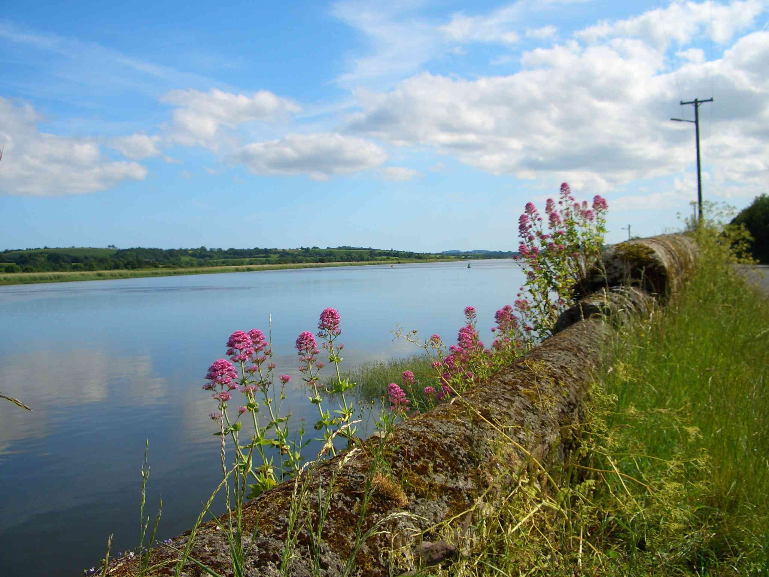 Waterford 02